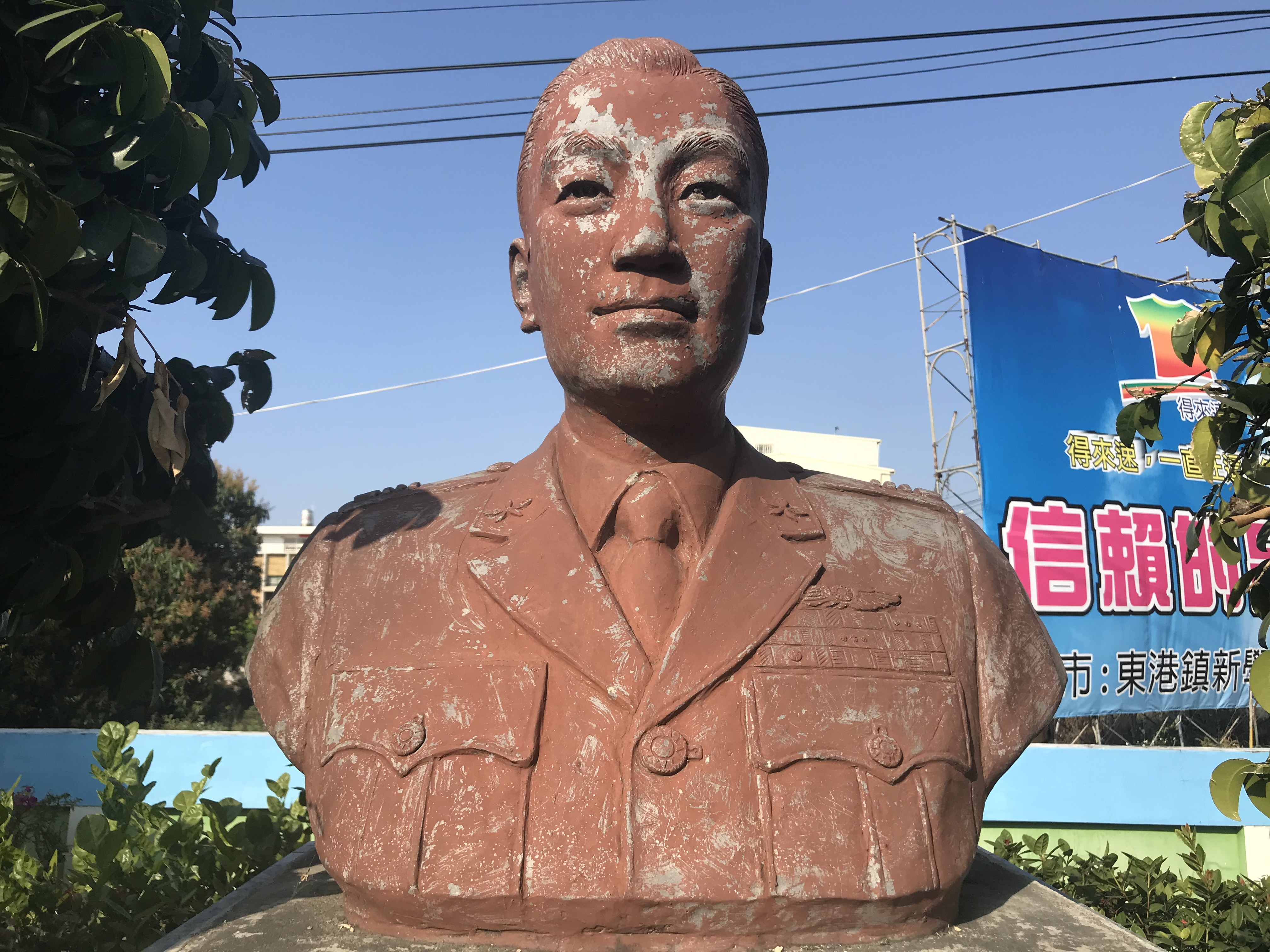 周以栗銅像照